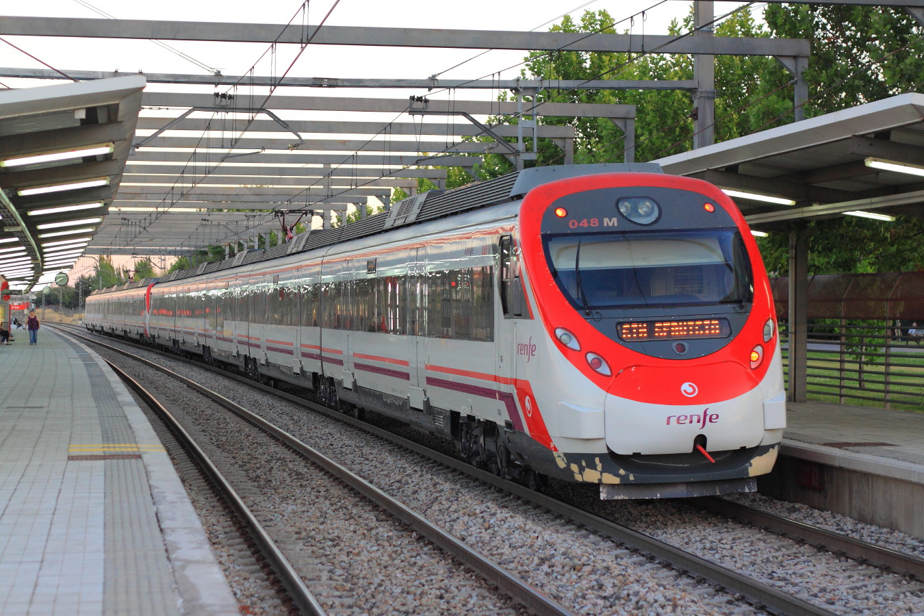 Un Civia de Renfe Operadora en la estación de El Casar.